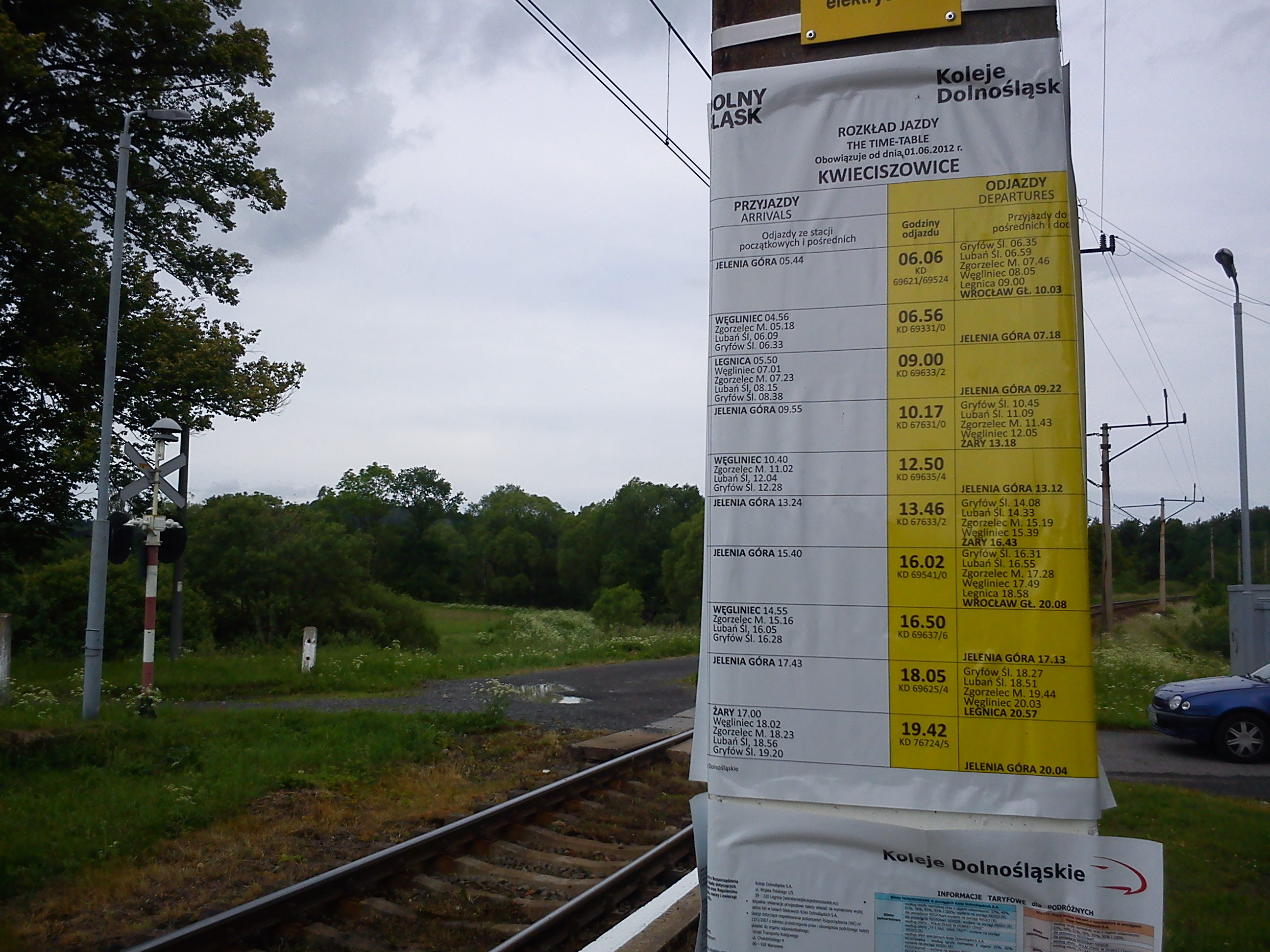 Rozkład jazdy pociągów na przystanku kolejowym Kwieciszowice.